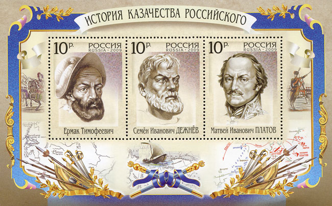 Почтовая марка России - История казачества Российского